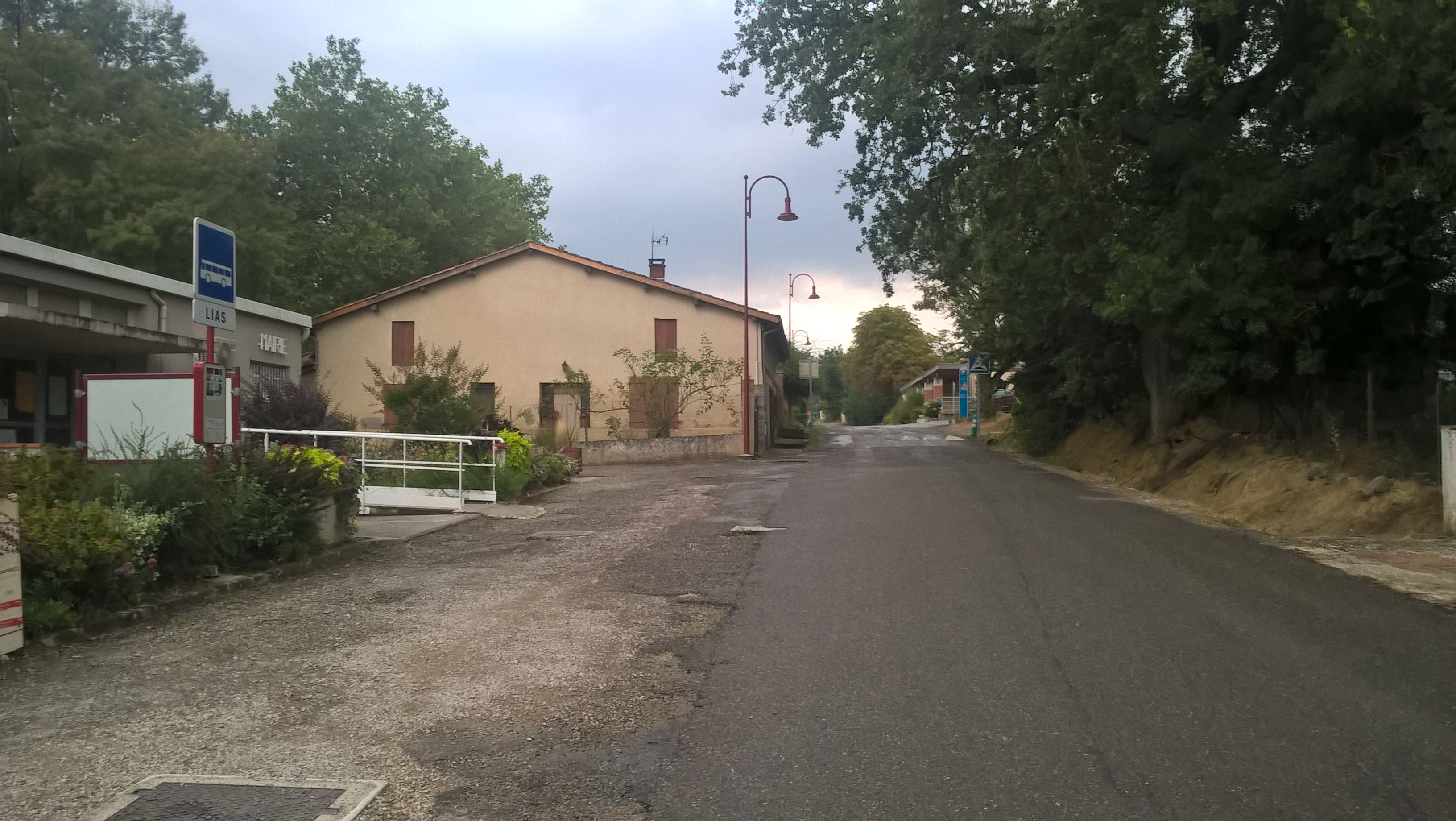 La route traversant Lias, vers L'Isle-Jourdain, Pujaudran et Bonrepos-sur-Aussonnelle. À gauche la salle polyvalente et mairie de la commune.